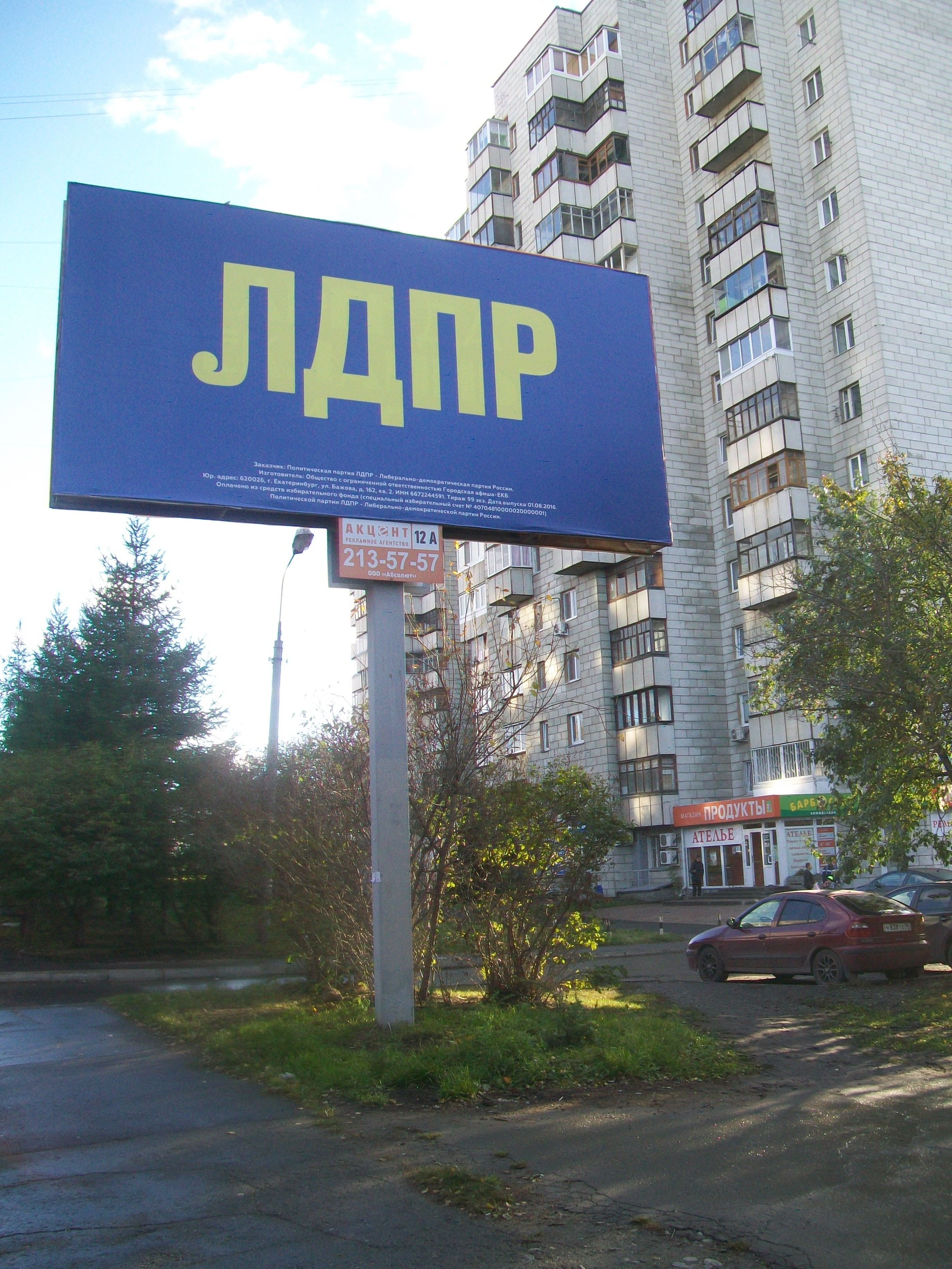 Агитационный щит ЛДПР в Екатеринбурге перед выборами в Государственную думу 2016 года